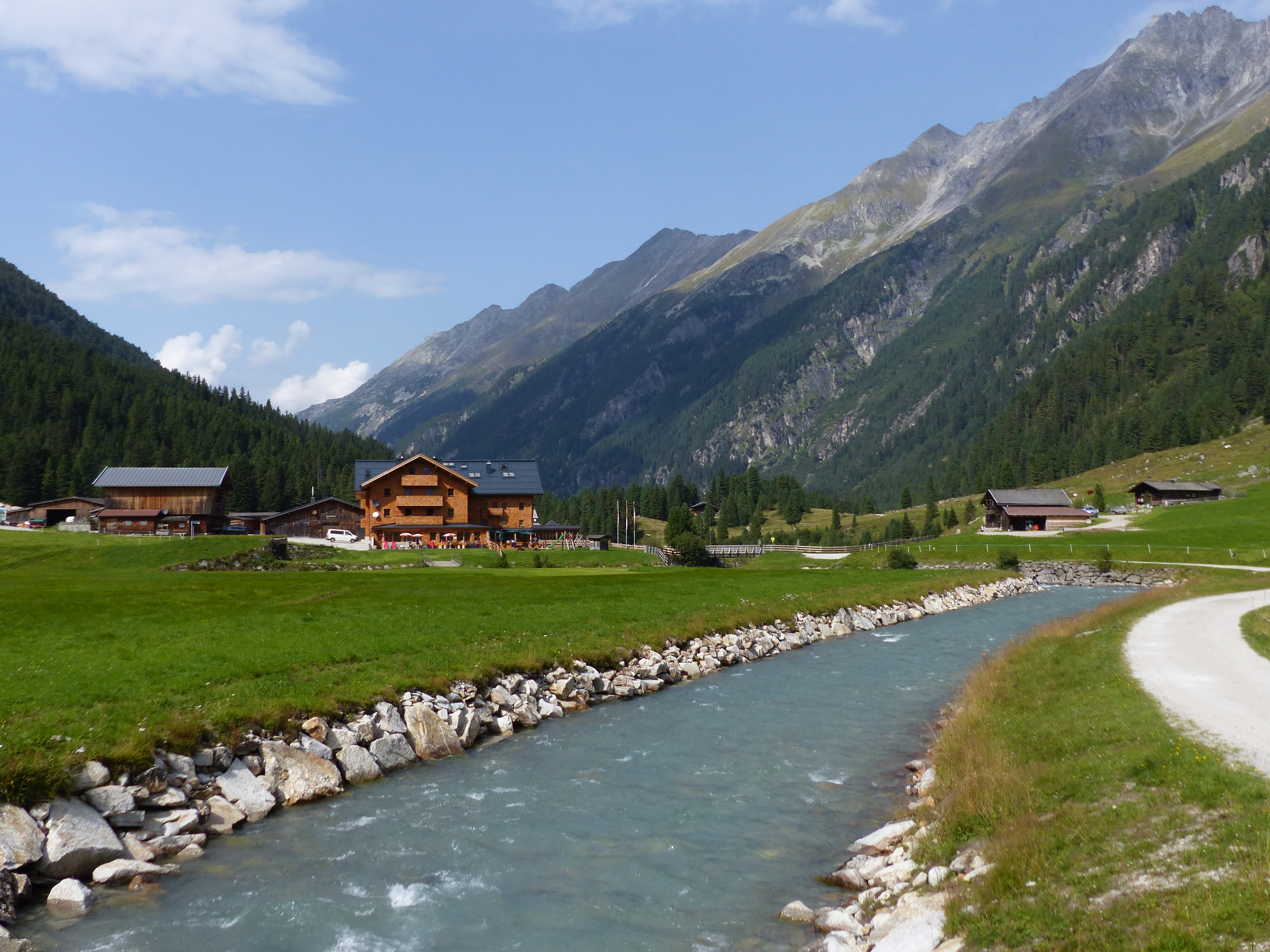 Krimmler Tauernhaus mit Krimmler Ache. Rechts die Blitzenbichlalm.